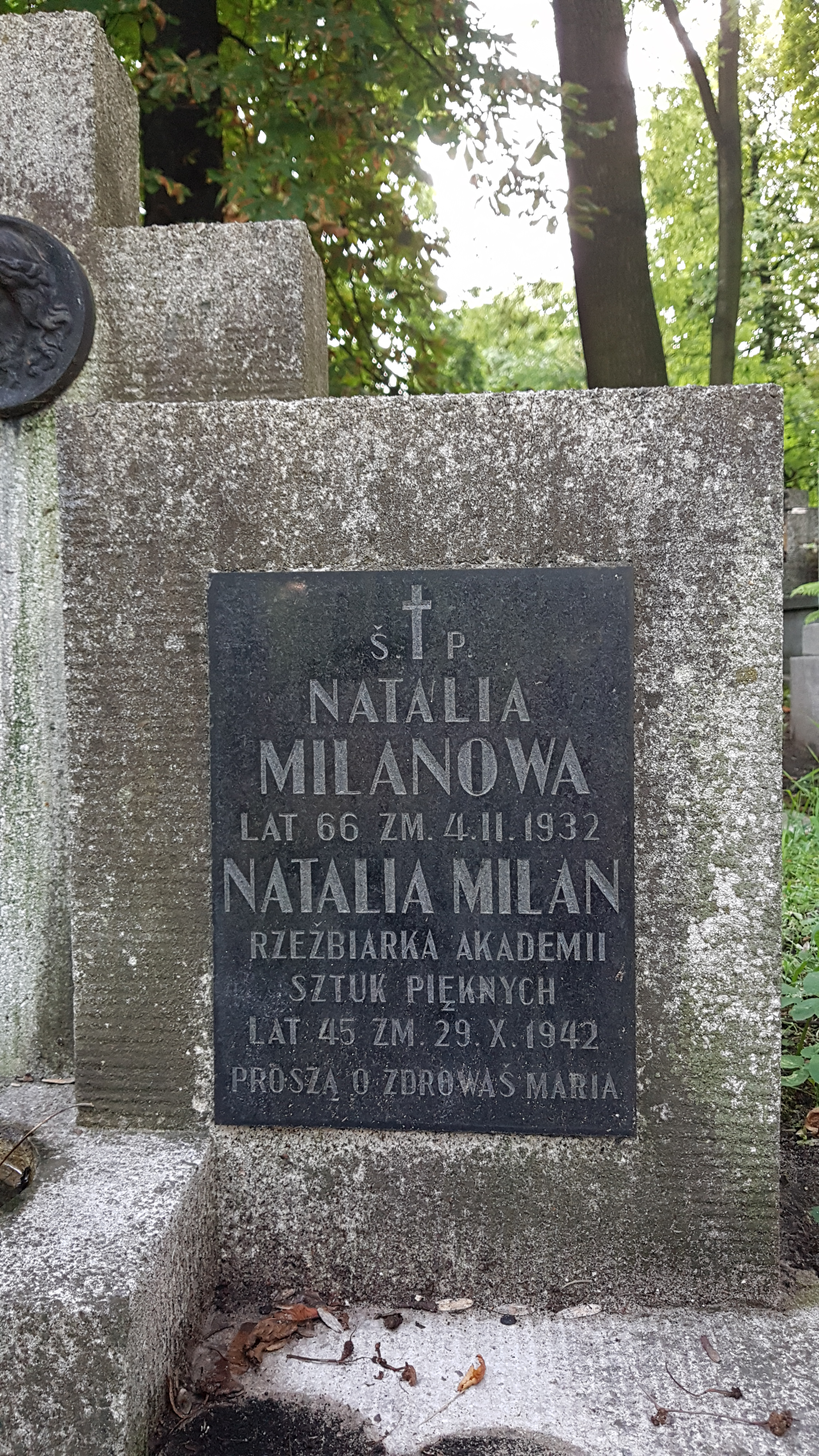 Grób rzeźbiarki Natalii Milan, jednej z pierwszych studentek na Akademii Sztuk Pięknych w Krakowie na Cmentarzu Podgórskim w Krakowie.